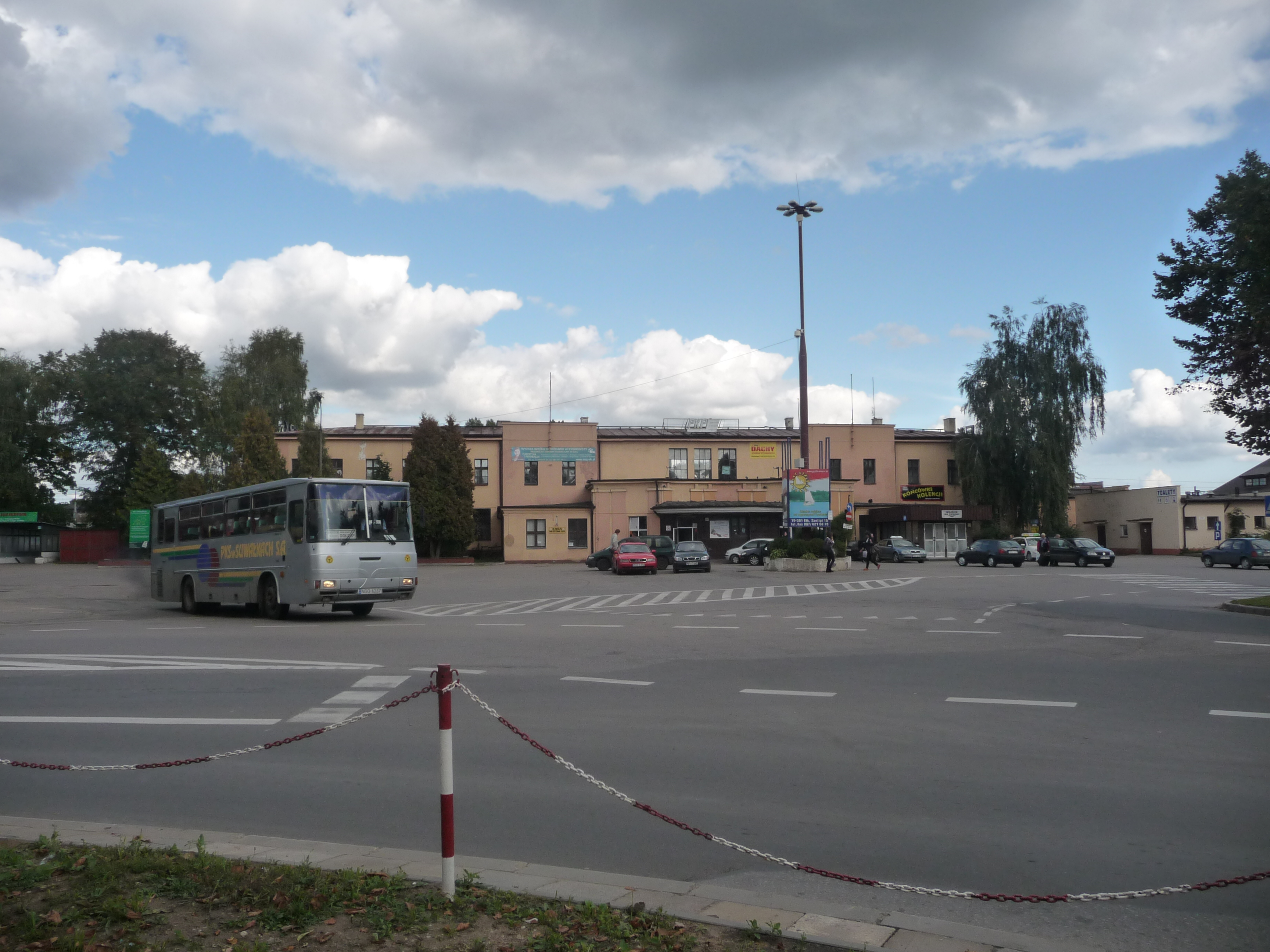 Polska